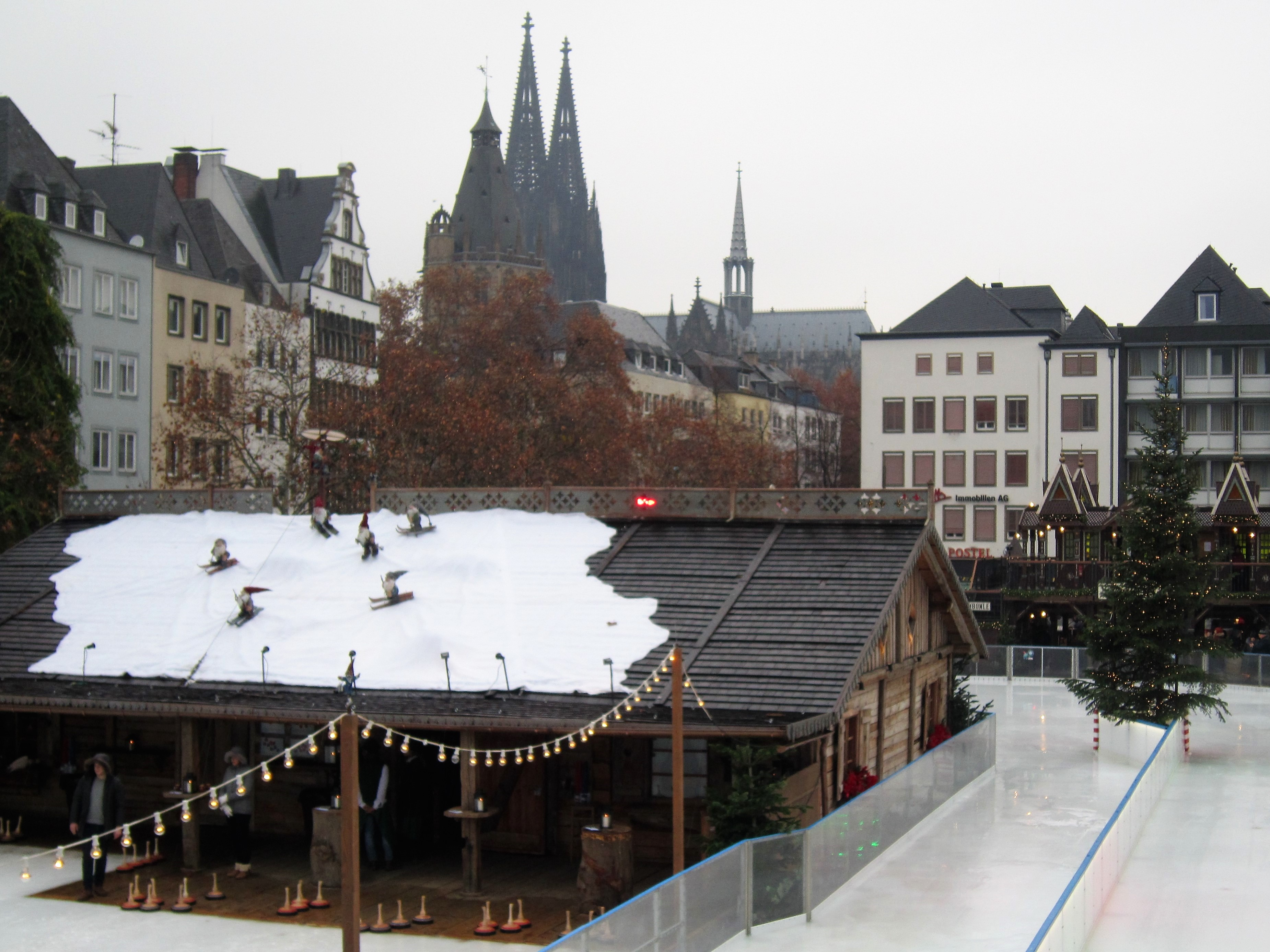 Ski fahrende Heinzelmännchen in "Heinzels Wintermärchen" (dem Weihnachtsmarkt auf dem Heumarkt / Alter Markt in Köln)